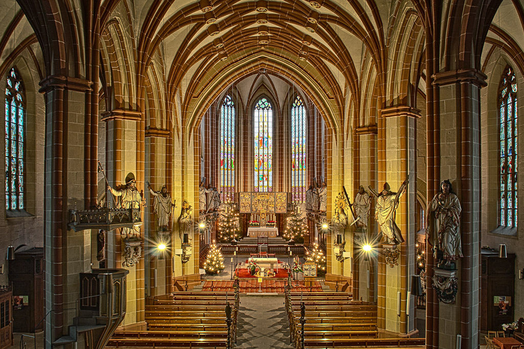 St.-Cyriakus-Kirche in Duderstadt, Niedersachsen, Deutschland. Blick auf den Flügelaltar im Hochchor.